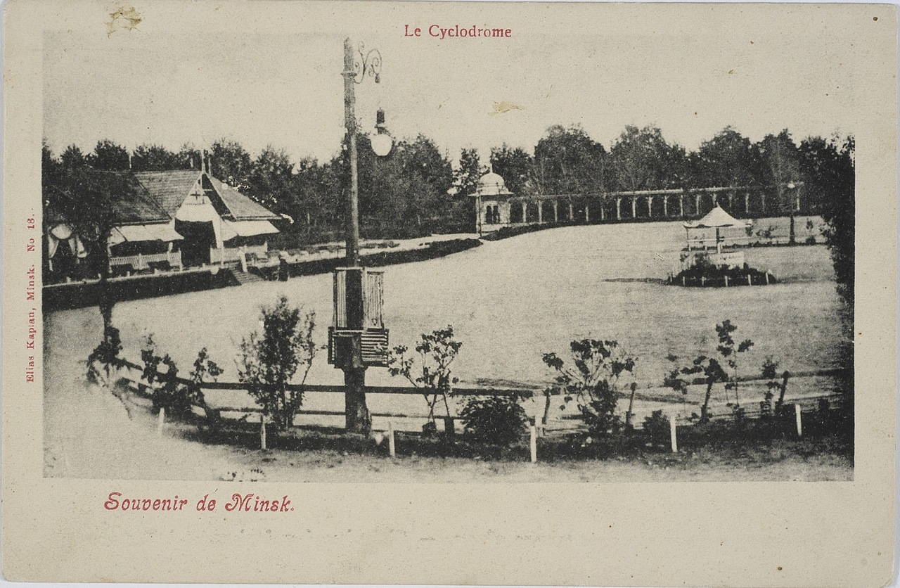 Открытка.